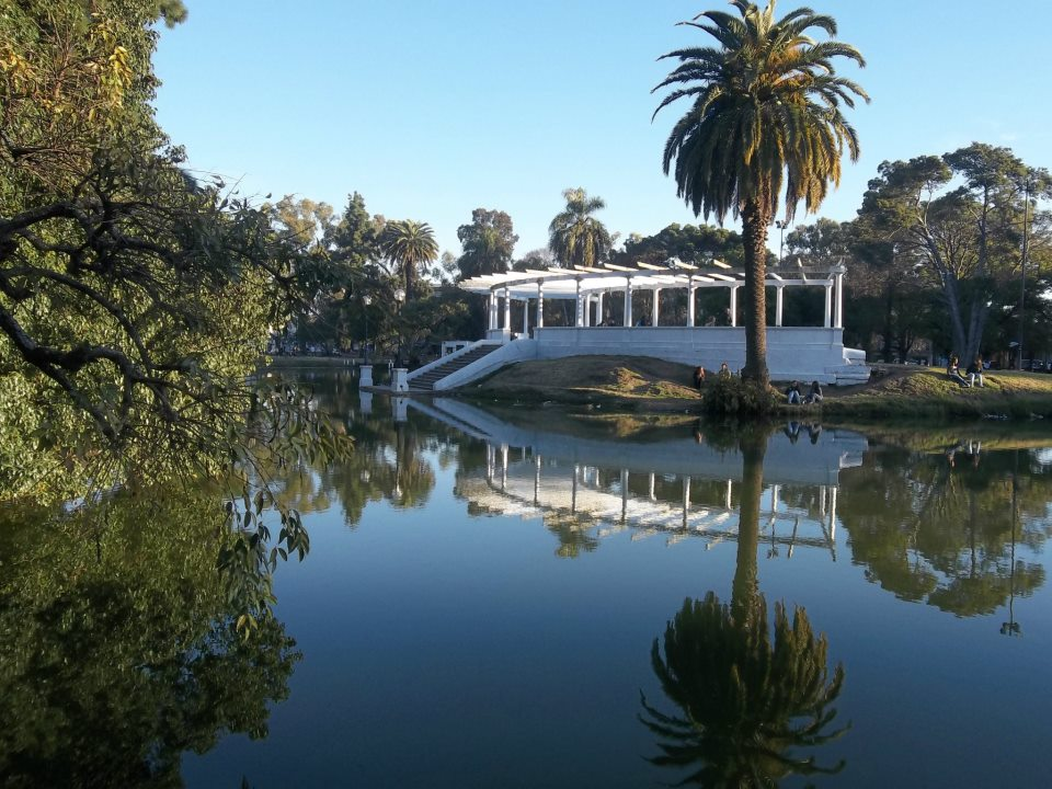 Administración de los Mataderos